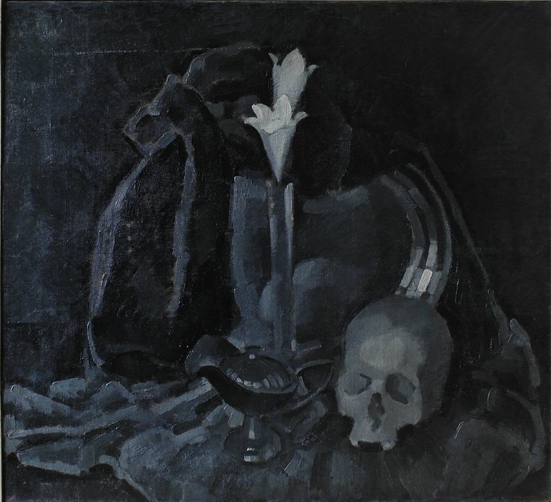 А. Блюменфельд, натюрморт с черепом